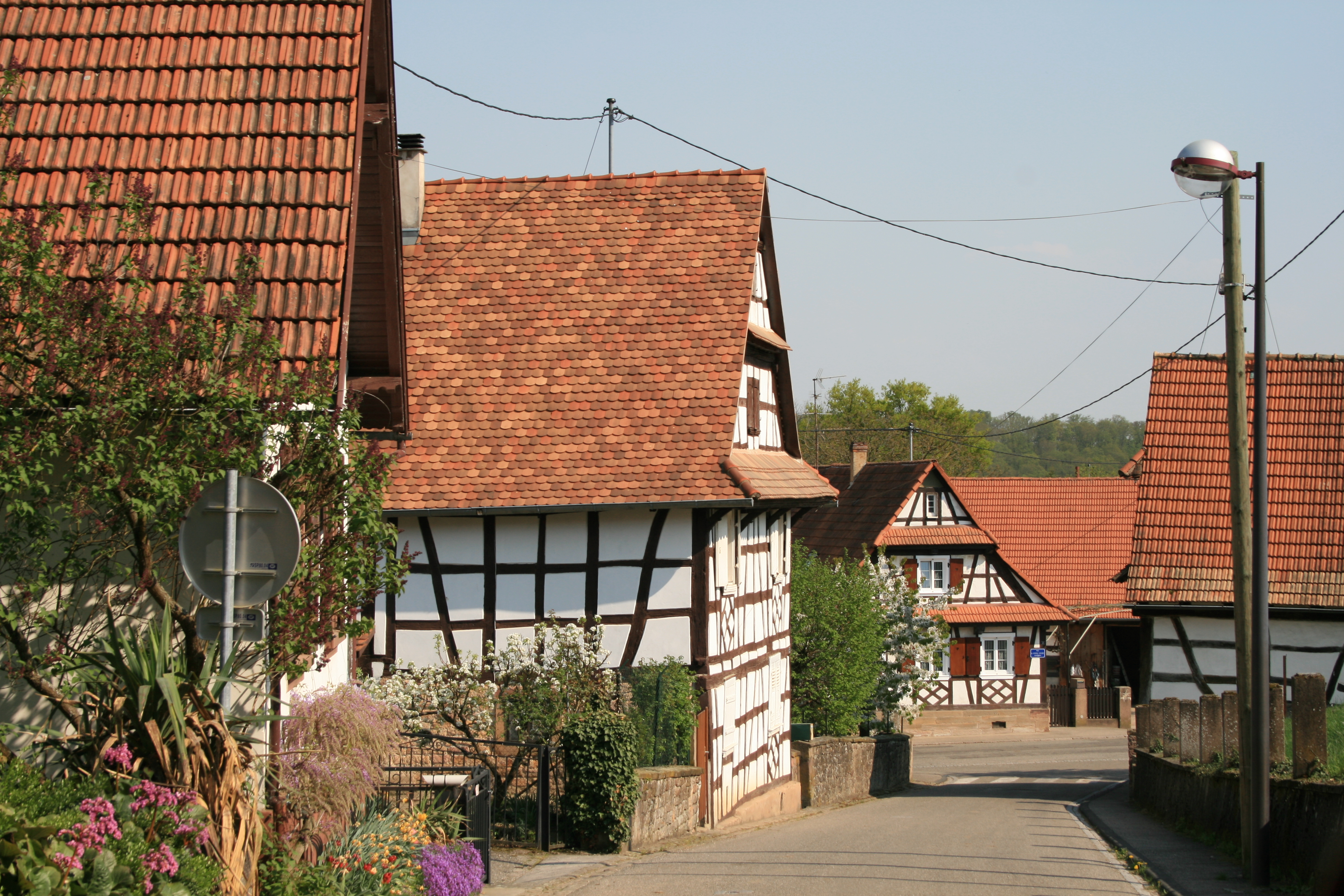 Lampertsloch, Alsace